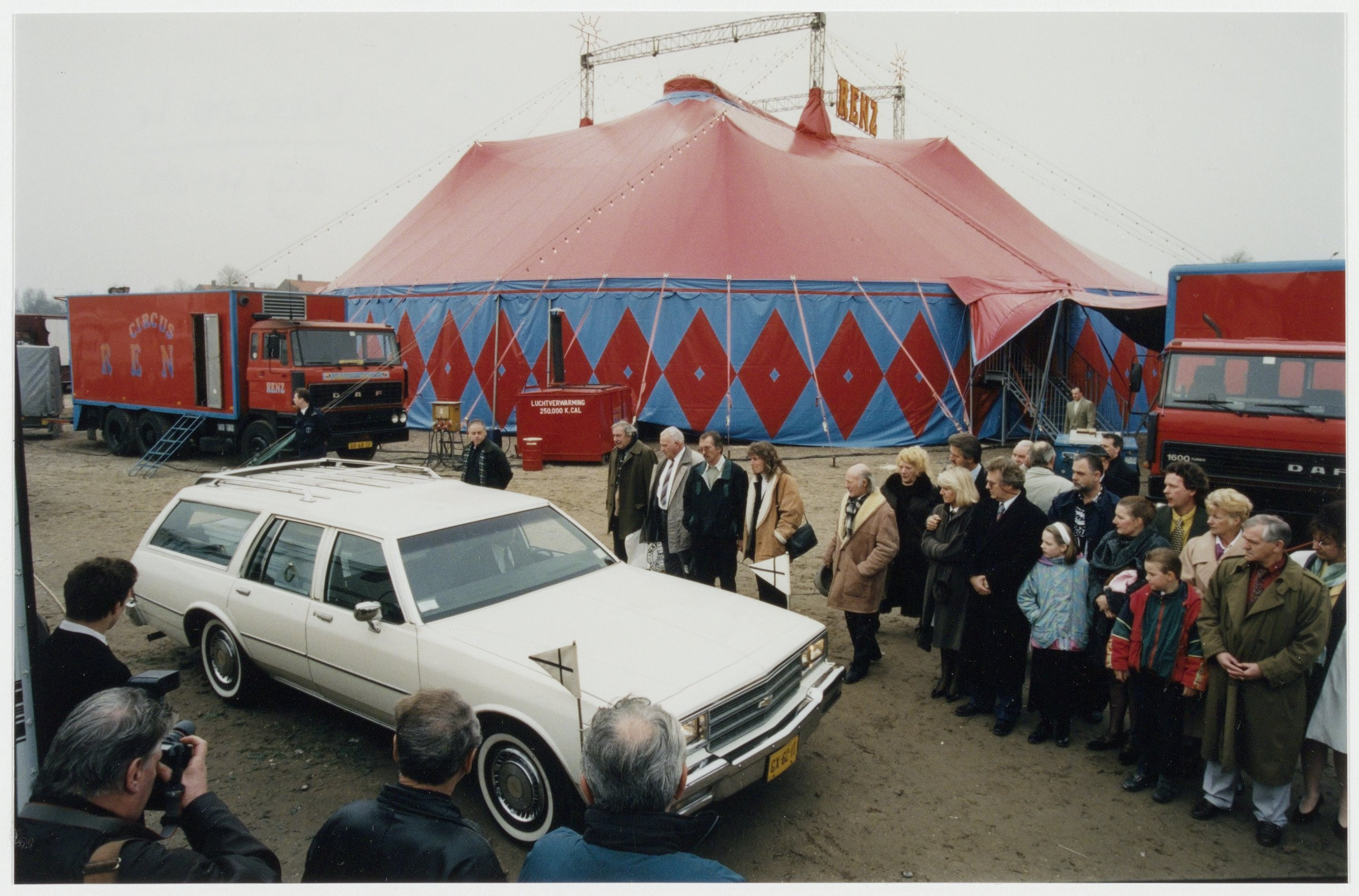 Afscheid van Herman Renz en Diana Luycx. Beiden kwamen door koolmonoxydevergiftiging om het leven. Boerhaavelaan, Schalkwijk, Haarlem